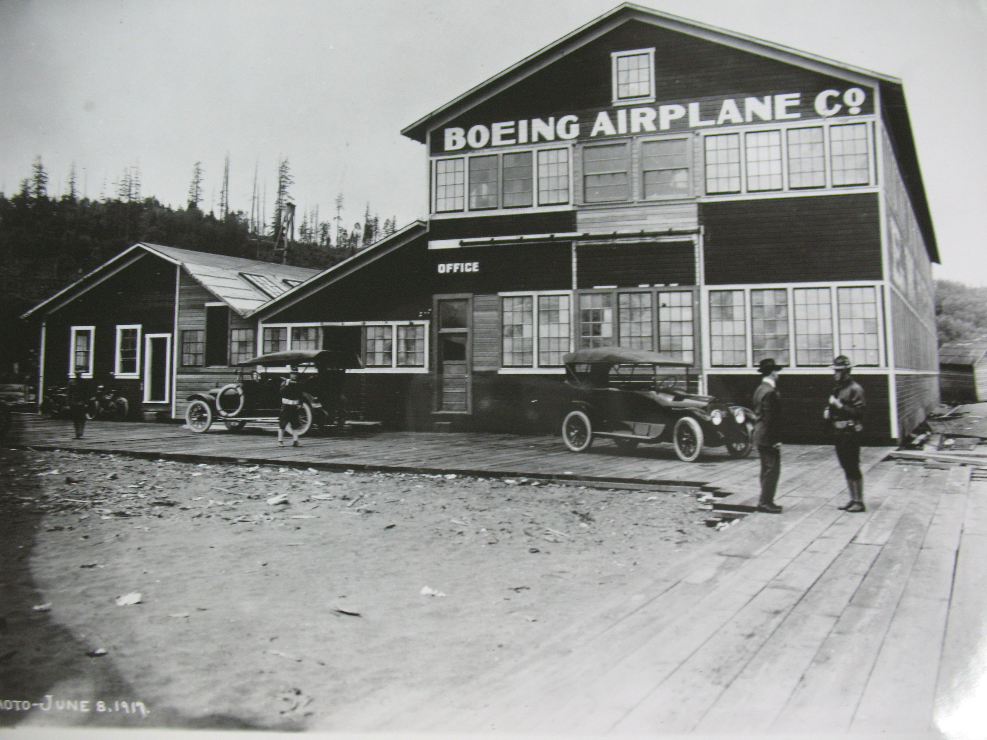 Boeing Plant, 1917